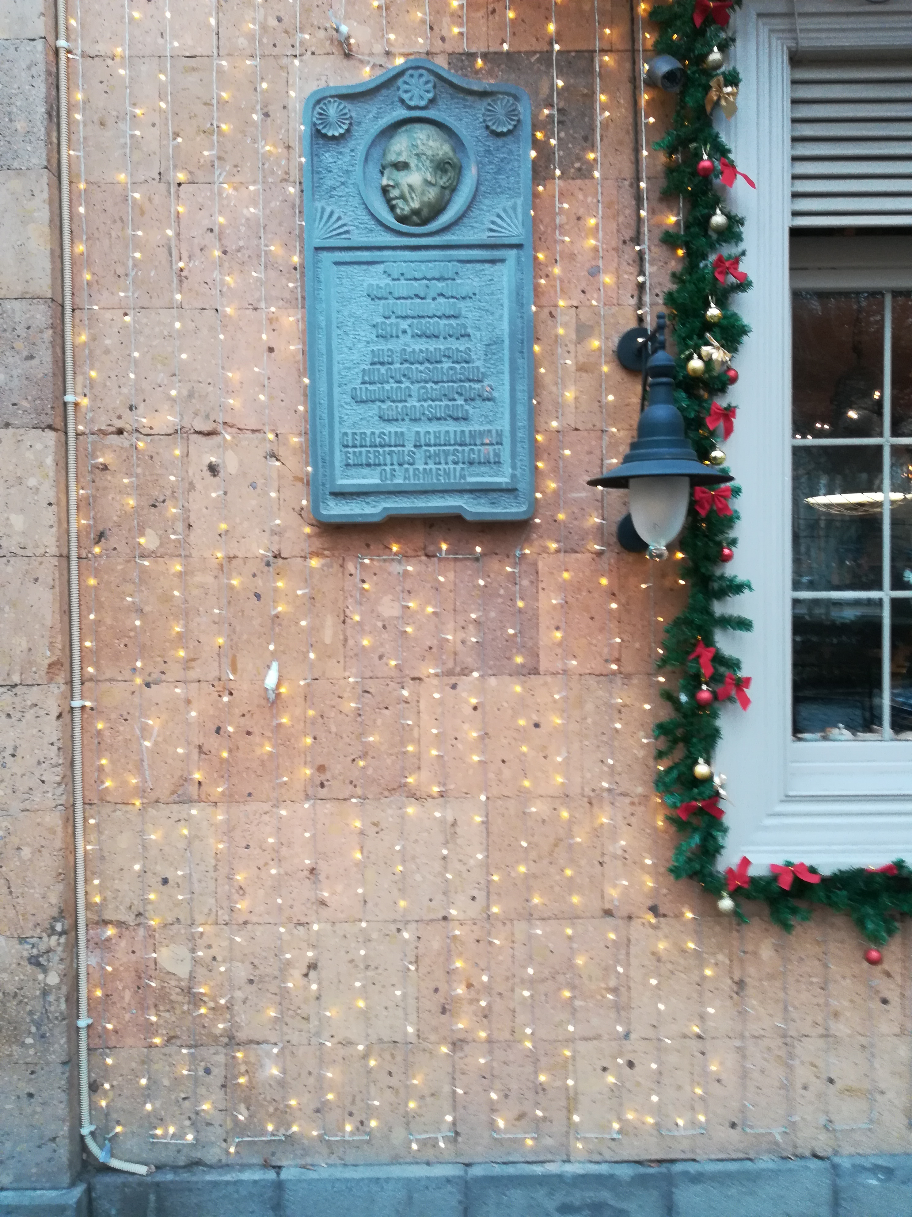 Ереван